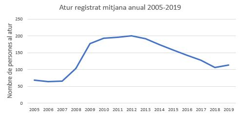 Atur registrat mitjana anual 2005-2019